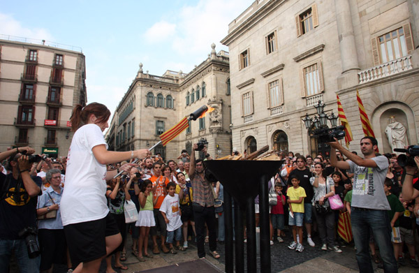 Encesa del Gresol amb la Flama del Canigó a la plaça Sant Jaume de Barcelona